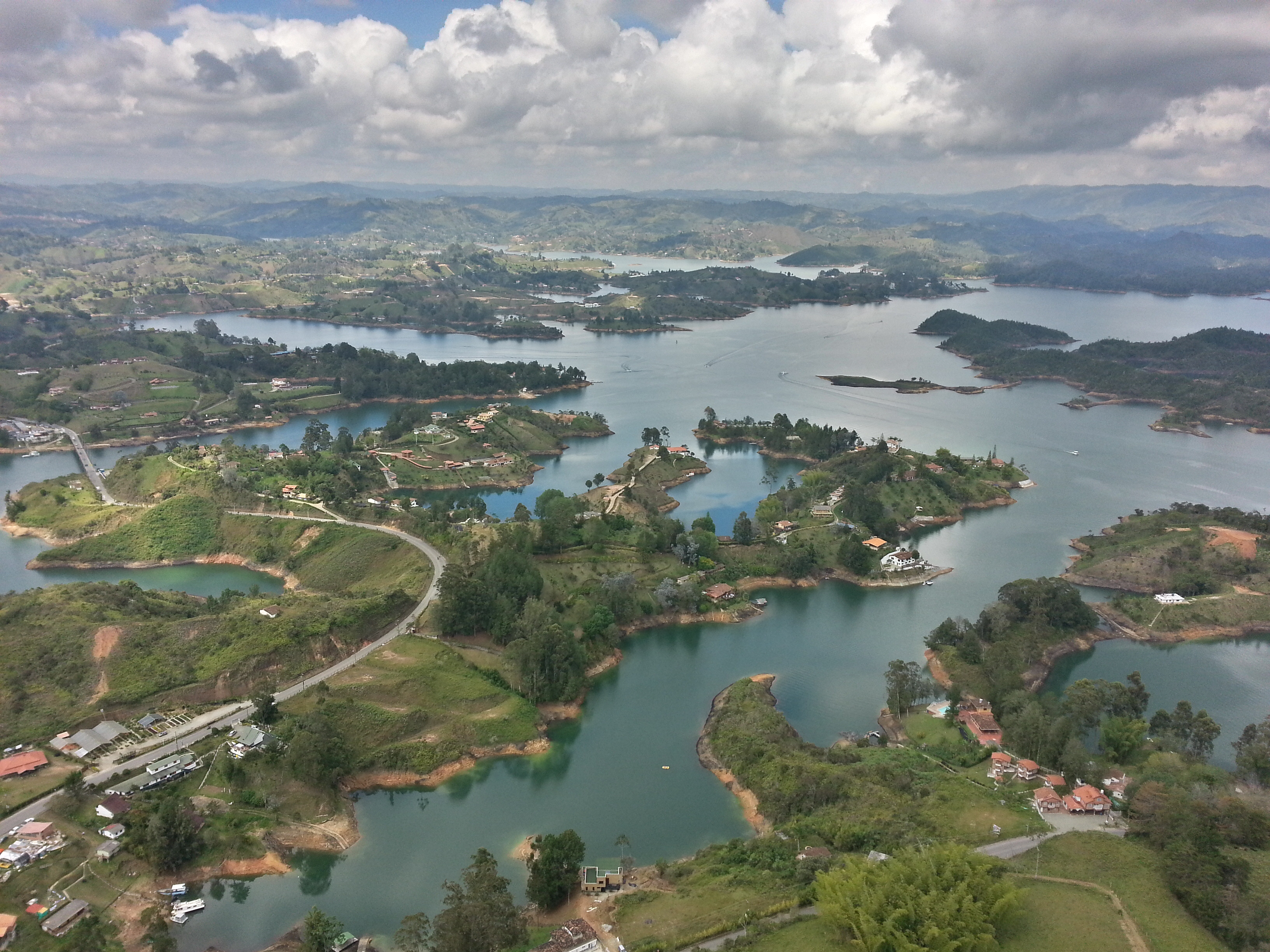 Aerial view at Guatape, Antioquia, Colombia